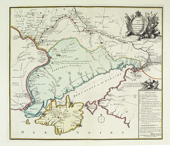 Carte de la Petite Tartarie Dresee par ordre de l'Imperatries de toutes las Russies. Amsterdam, ca. 1785. In original colours. 410x470mm. Mint condition. Large paper copy.